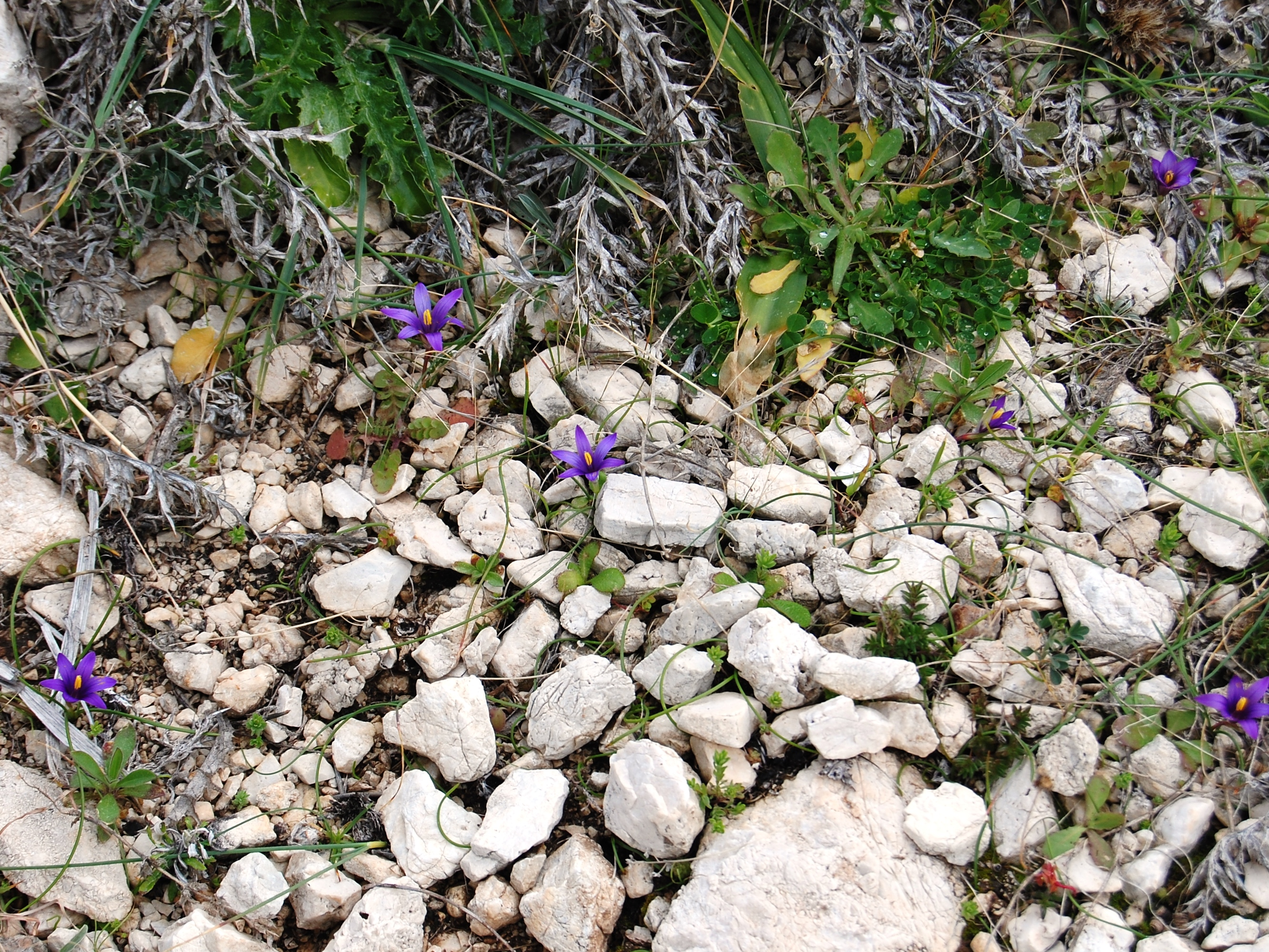 Romulea linaresii Parl. Riserva naturale Monte Cofano, Sicily